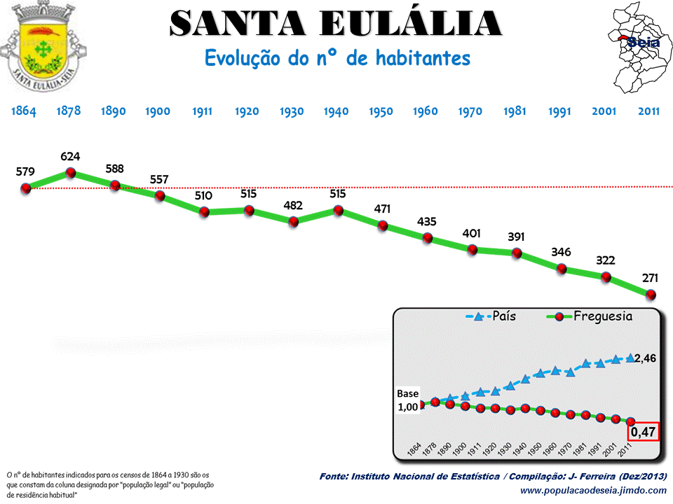 Evolução da População 1864 / 2011